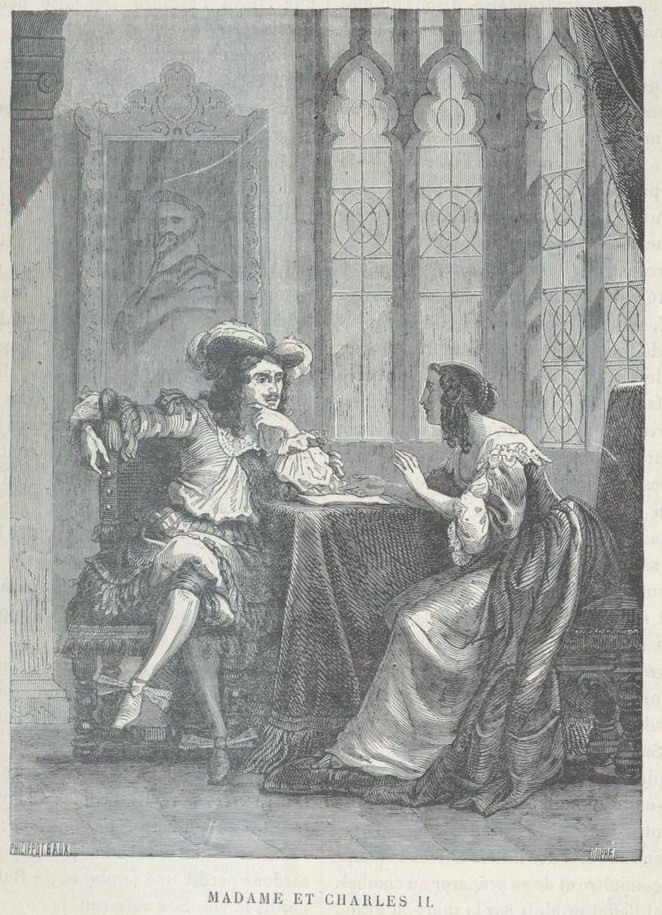 Henriette d'Angleterre négociant le traité de Douvres en 1670 avec Charles II. Gravure française de 1880.